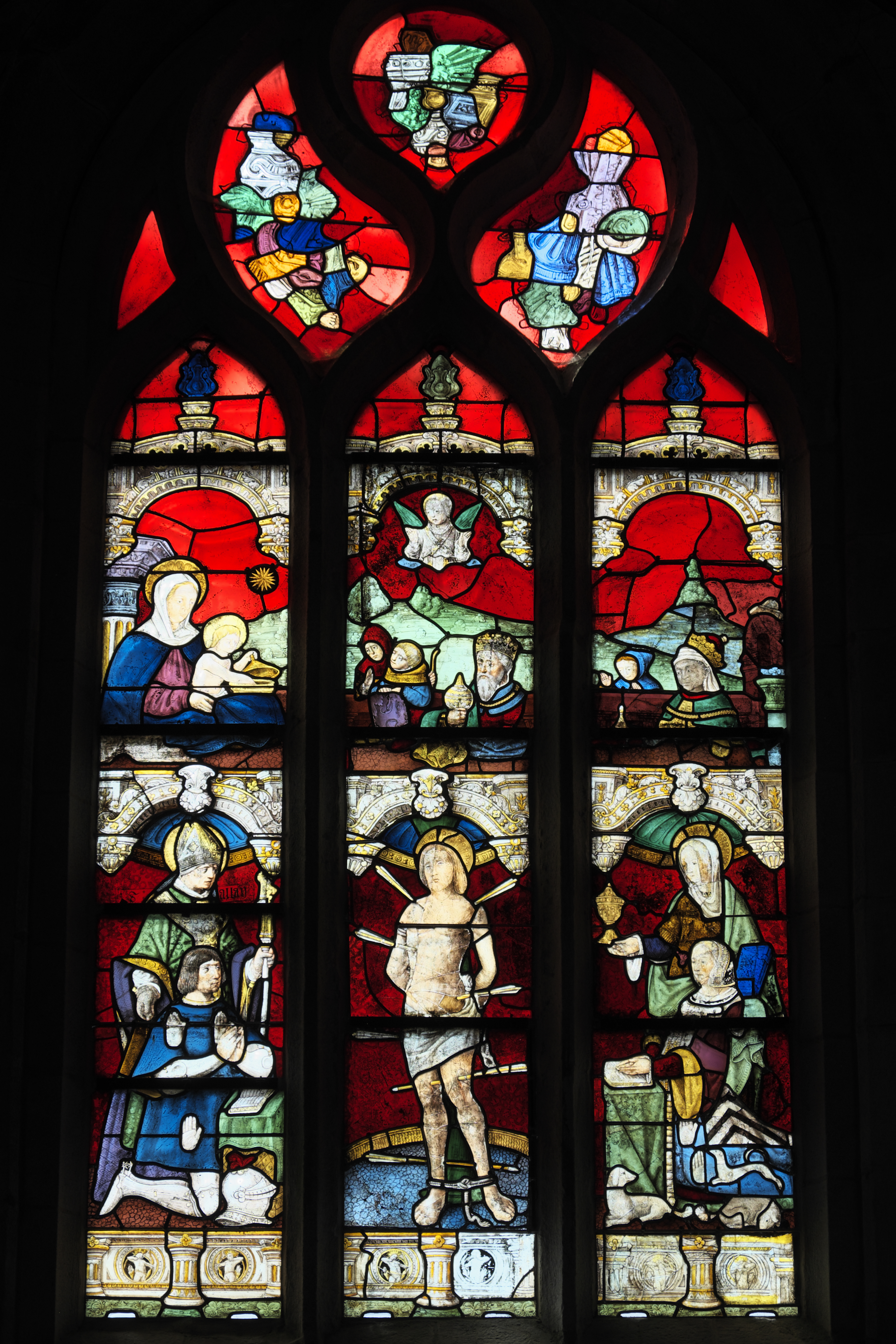 Katholische Pfarrkirche Saint-Thurien in Plogonnec im Département Finistère (Region Bretagne/Frankreich), Bleiglasfenster (baie 5) mit Fragmenten um 1520/25; Darstellung: Heiliger Sebastian (Mitte), Stifter und Stifterin mit Schutzpatronen